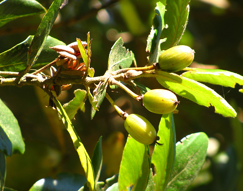 Ulmo (Eucryphia cordifolia) - immature fruits